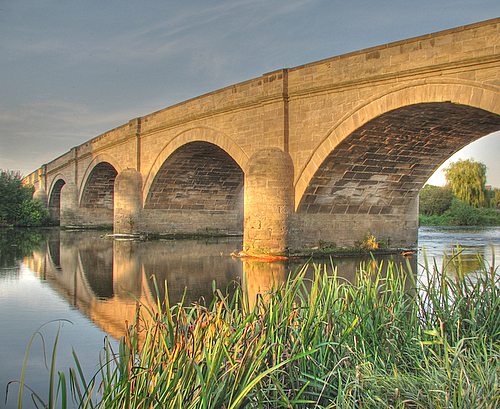 Swarkestone Bridge